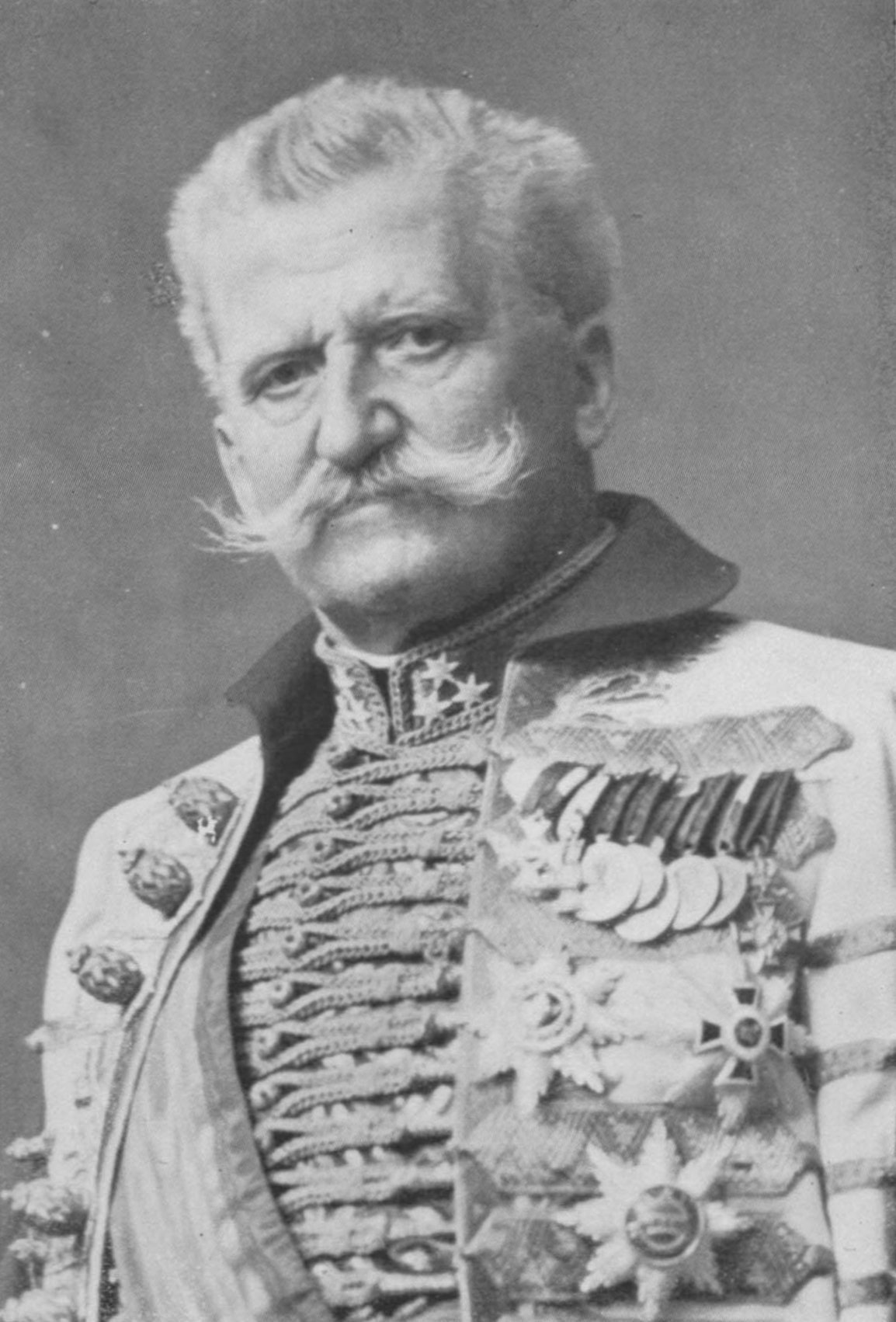 Fejérváry Géza (1833-1914) katonatiszt, miniszterelnök